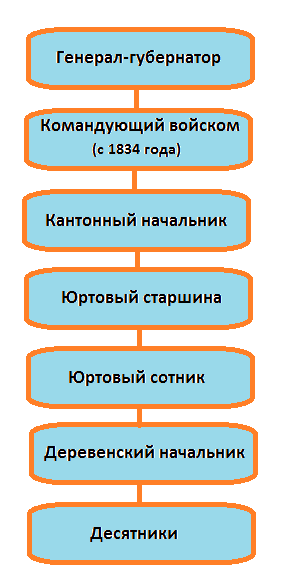 Чиновичья иерархия в Кантонной системе управления в Башкортостане